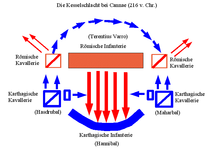 Die Kesselschlacht bei Cannae Skizze